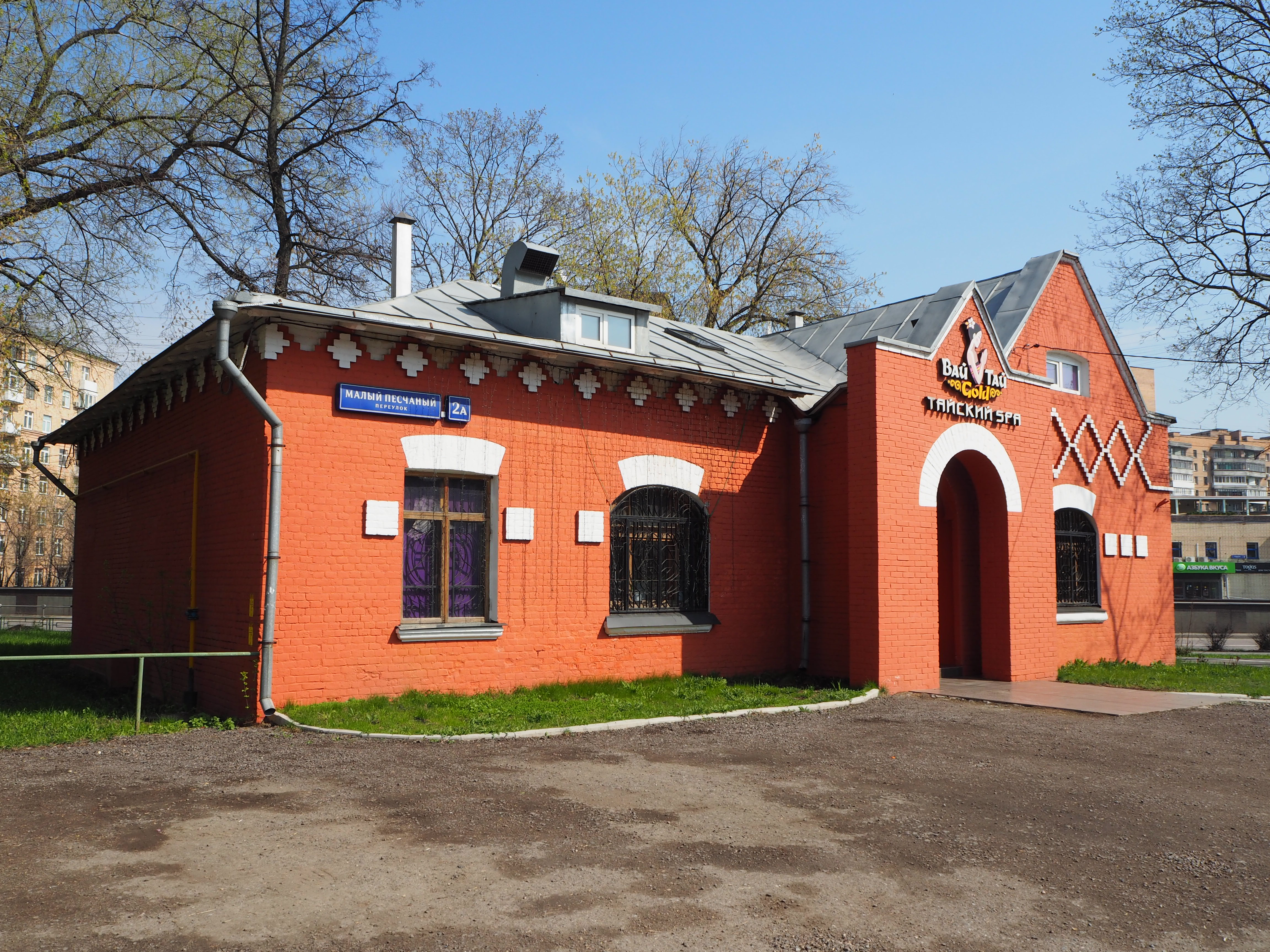 Часовня кладбища «Арбатец».